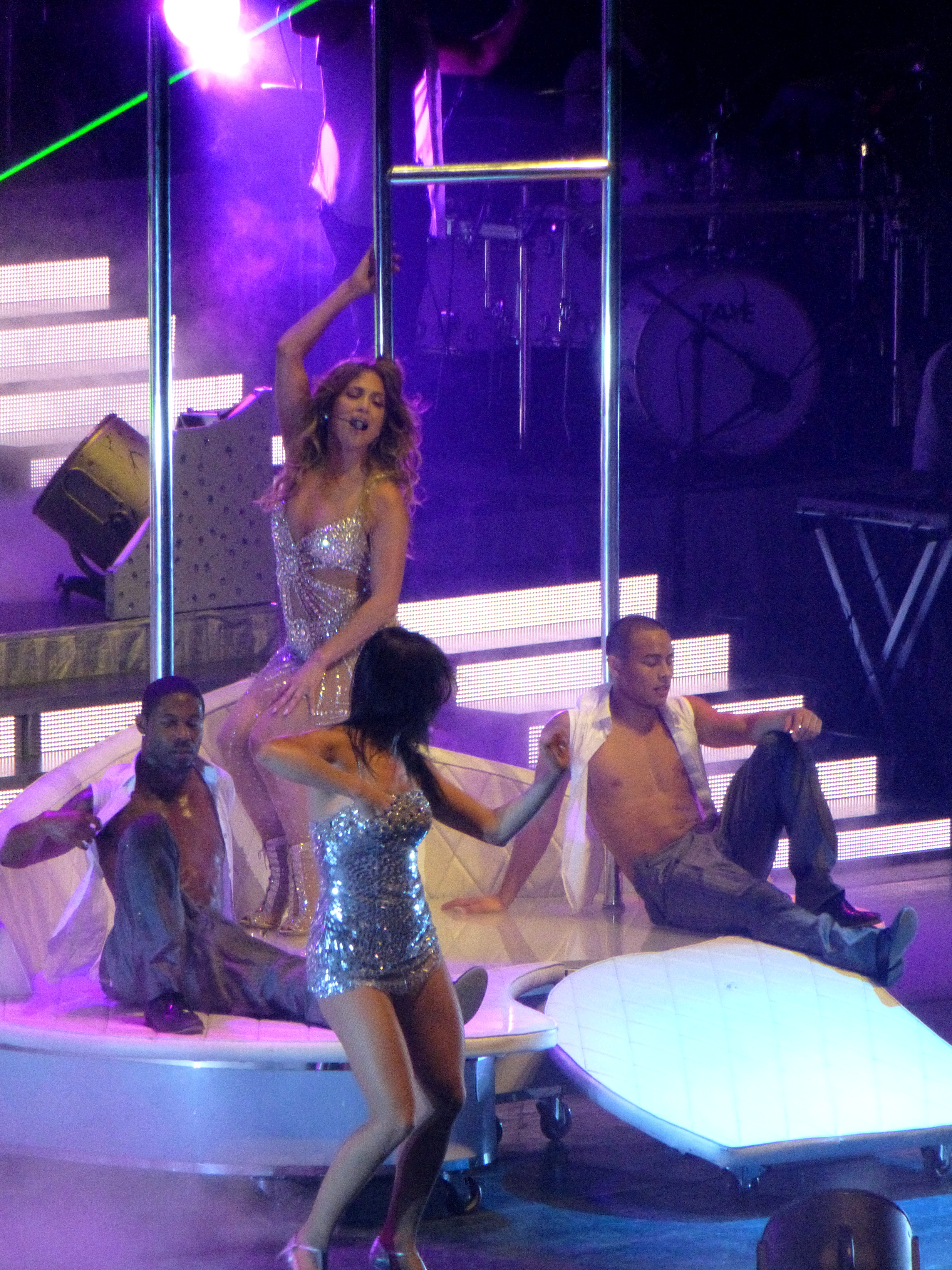 Jennifer LOPEZ en concert à Paris Bercy dans le cadre du " DANCE AGAIN WORLD TOUR " en OCTOBRE 2012